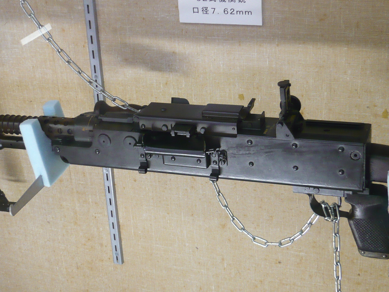 山形県東根市神町駐屯地史料館で展示されている62式7.62mm機関銃（クローズアップ）